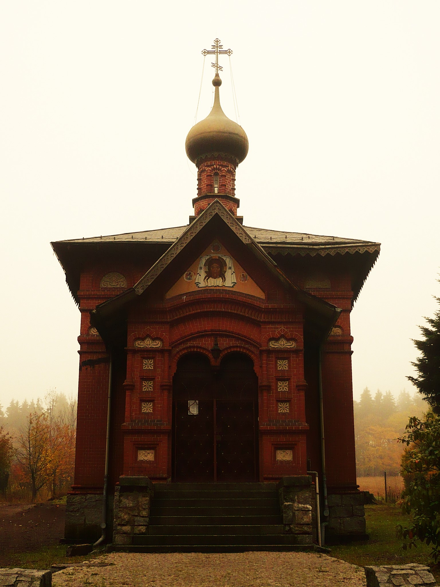 Sokołowsko. Cerkiew